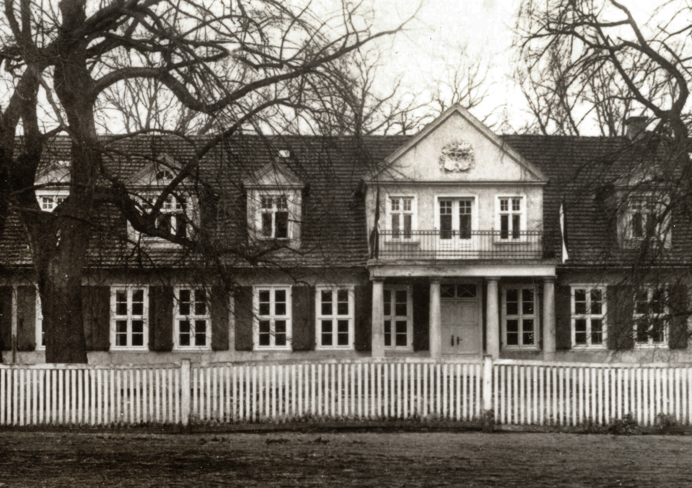 Historische Photographie von 1919 des Rittergutes Arnim bei Stendal. Klassizistisches Herrenhaus aus dem Jahre 1825, erbaut von Wilhelm Gustav Woldeck von Arneburg (1802-1843). Über dem Hauptportal der Frontseite im Norden das 1904 angebrachte Vereinigungswappen der Familien v. Doering und Finck v. Finckenstein. Das Gutshaus wurde 1938 von den Nachbesitzern abgebrochen.